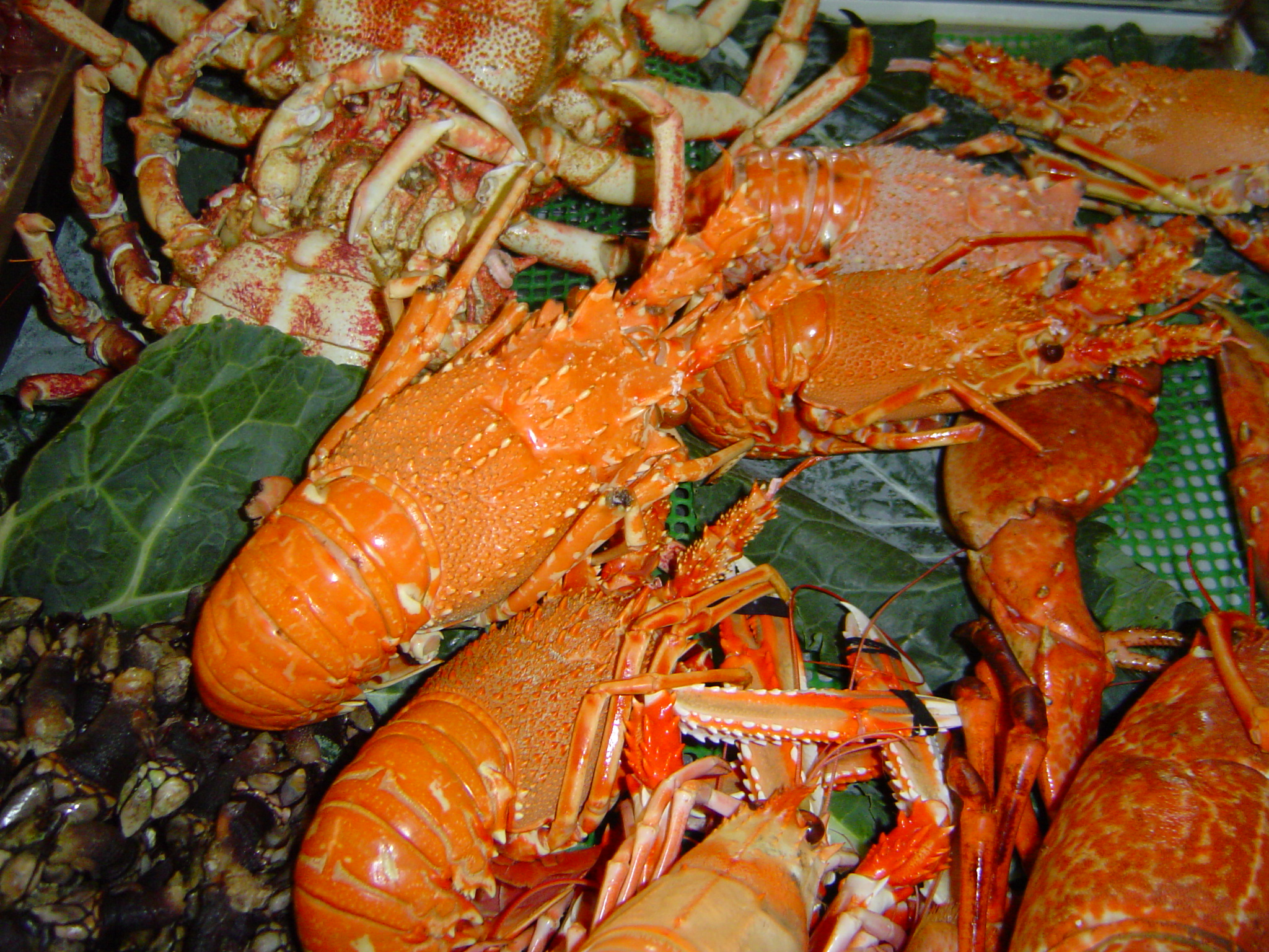 Homard